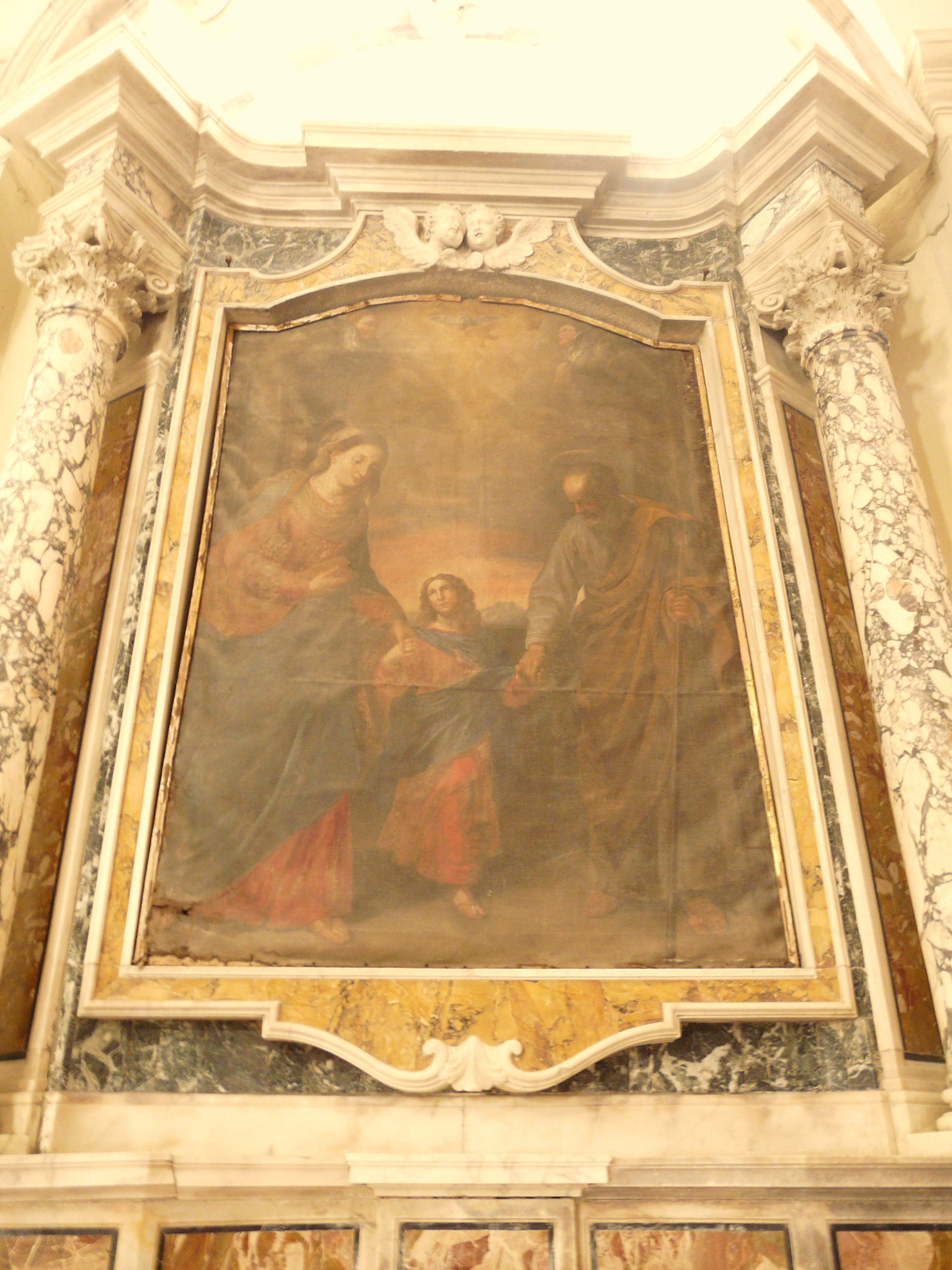 Chiesa-Santuario di San Remigio, Fosdinovo, Toscana, Italia